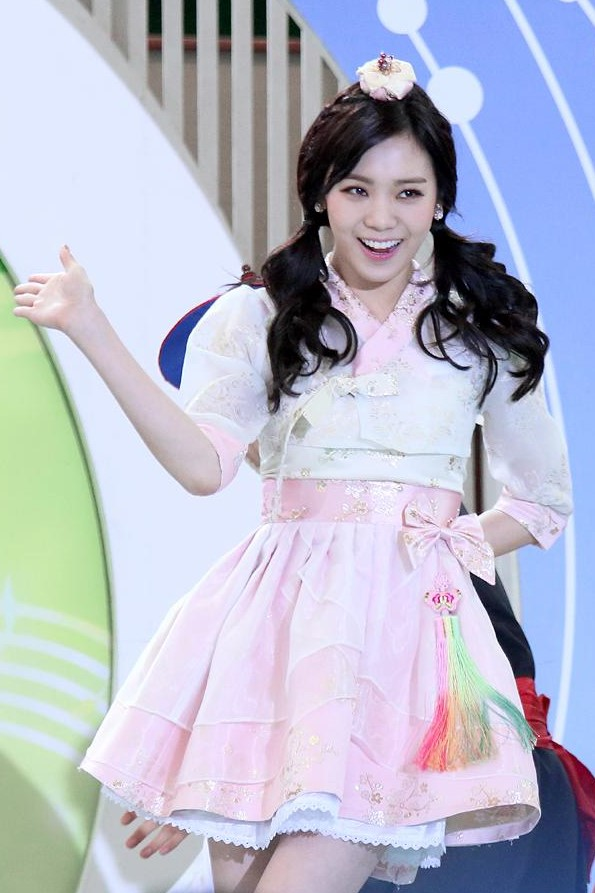 150117 양산 전국노래자랑